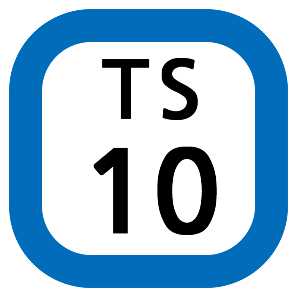 TS-10